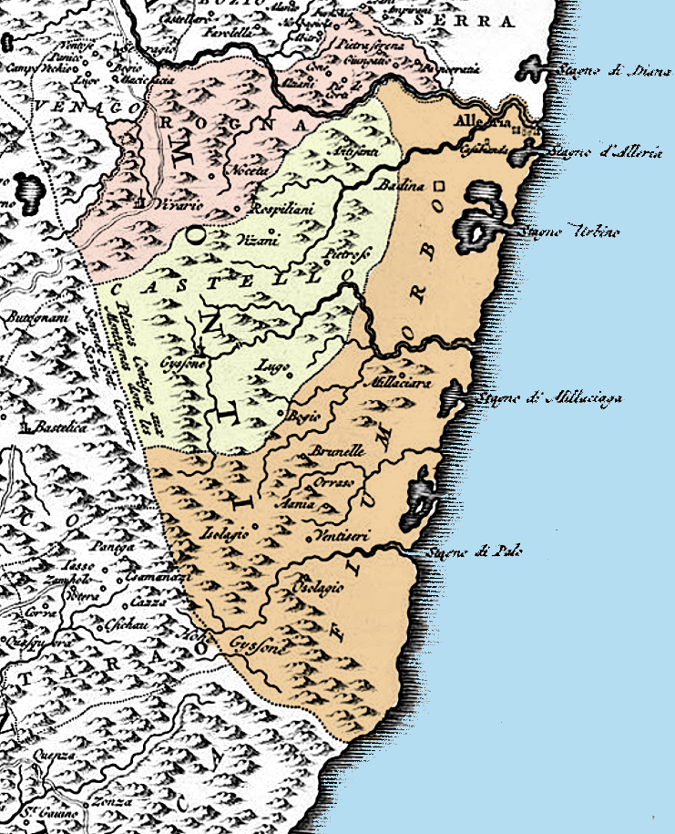 Extrait concernant les pièves de Rogna, Castello et Fiumorbu, de la carte du capitaine Vogt (1737)